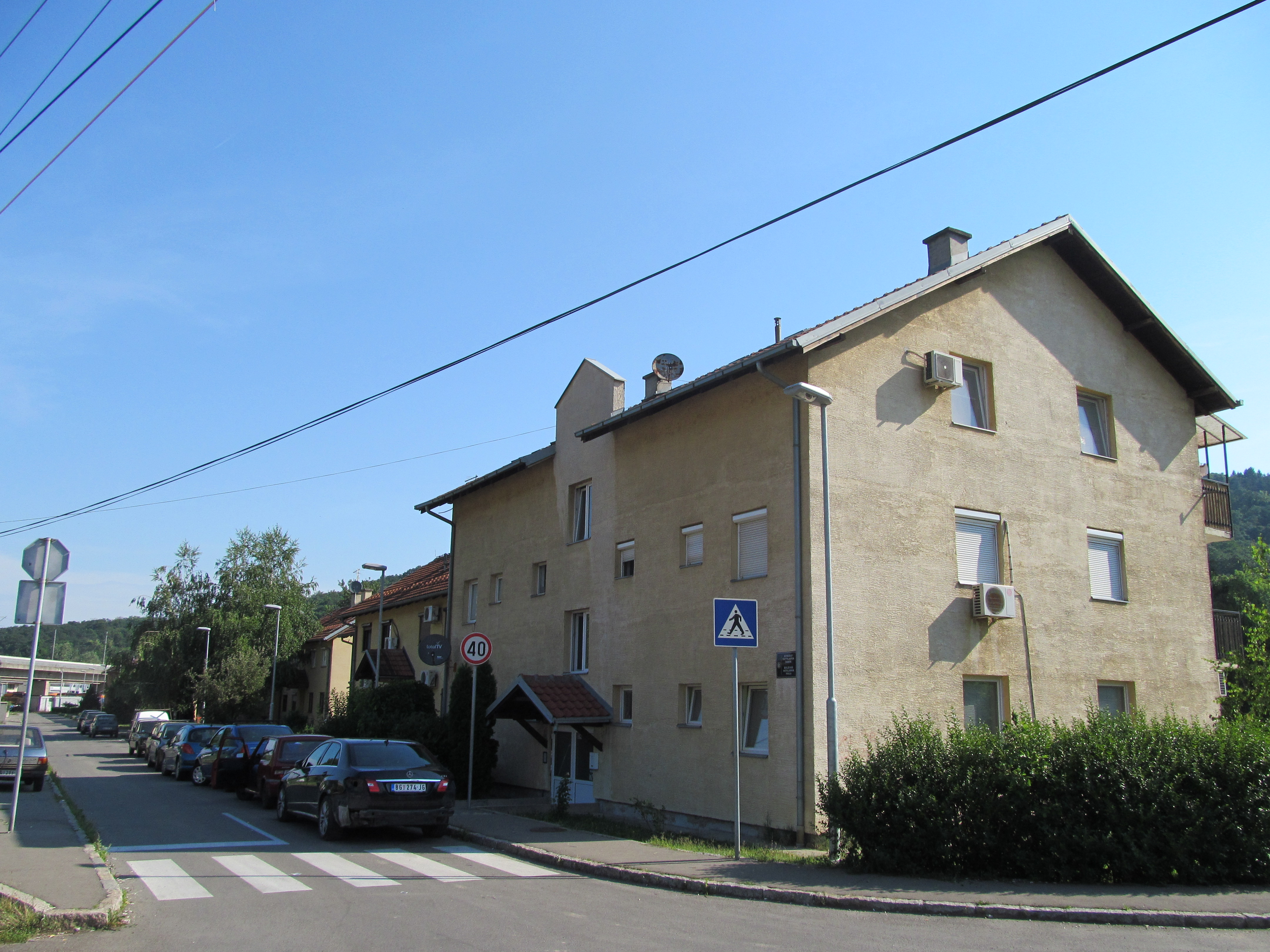 Дома беженцев в Раковице, Белград